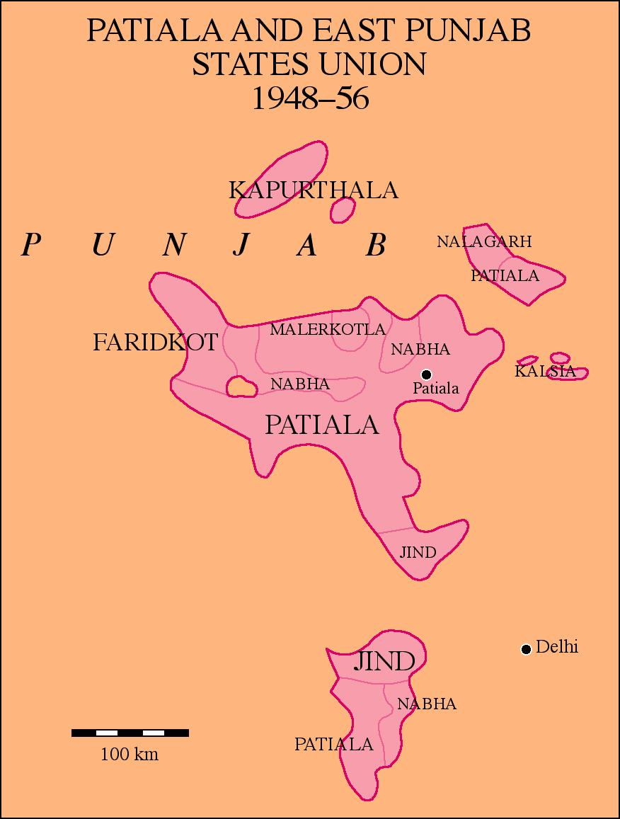 Karte der PEPSU